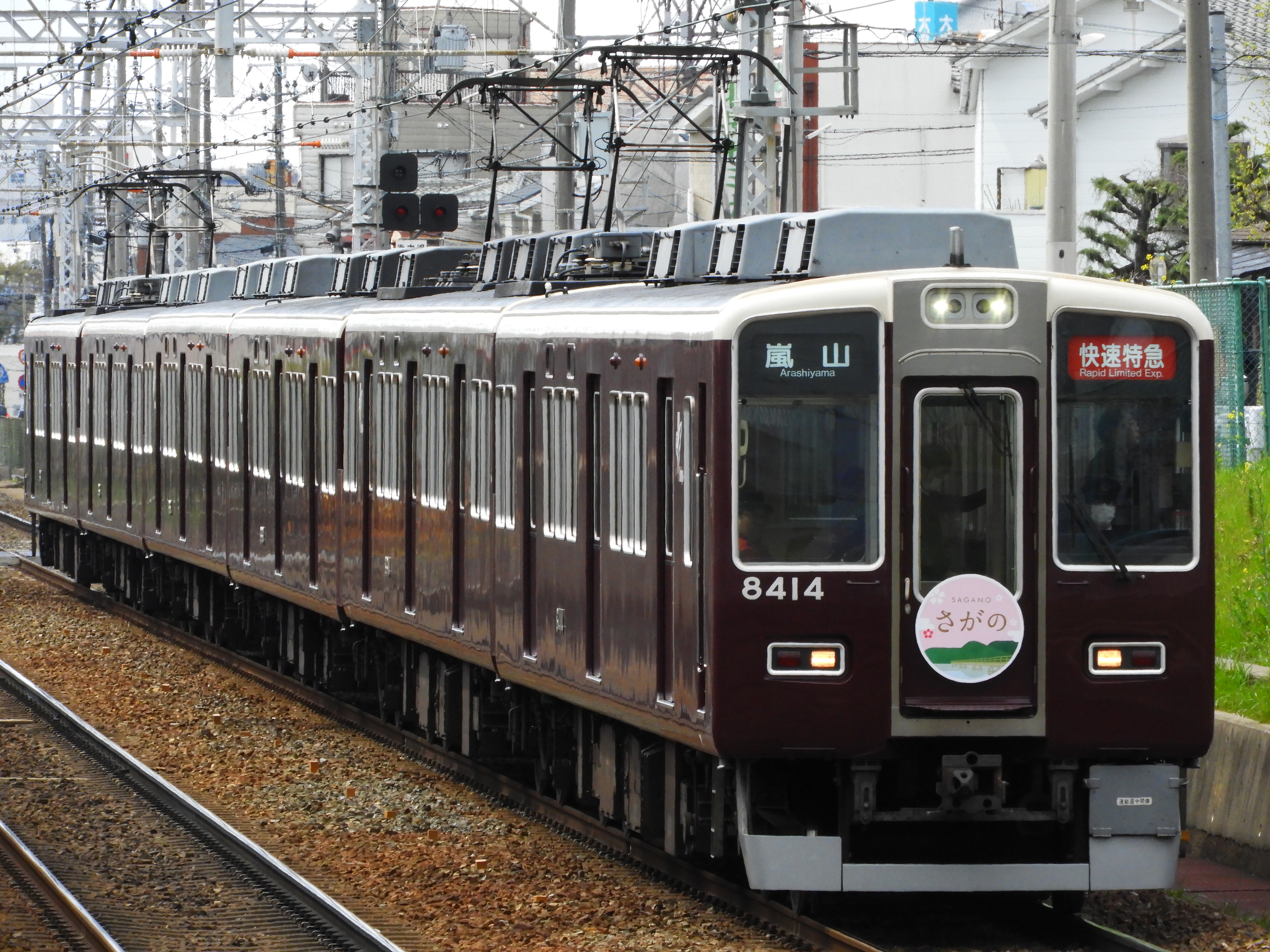 阪急8300系6両編成による行楽期臨時列車 快速特急「さがの」嵐山行き。富田～総持寺